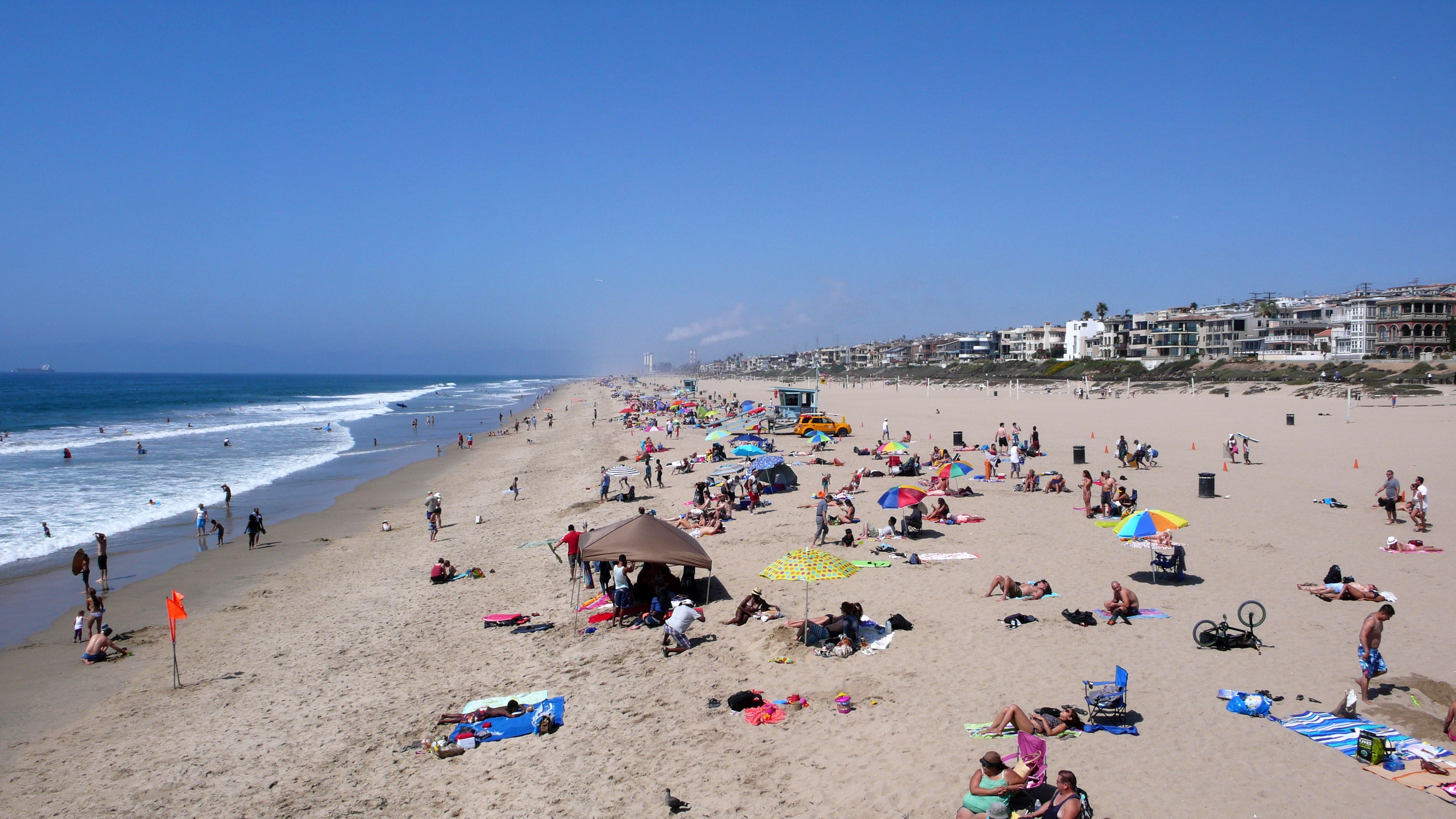 Manhattan Beach 1